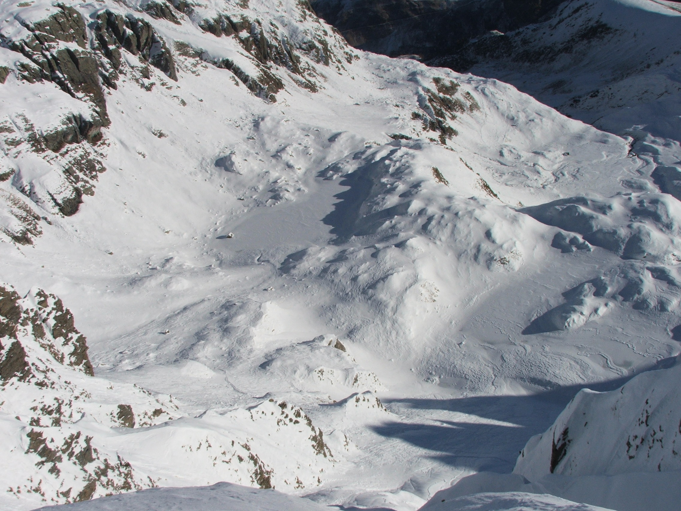 Laghetti Ponteranica innevati.